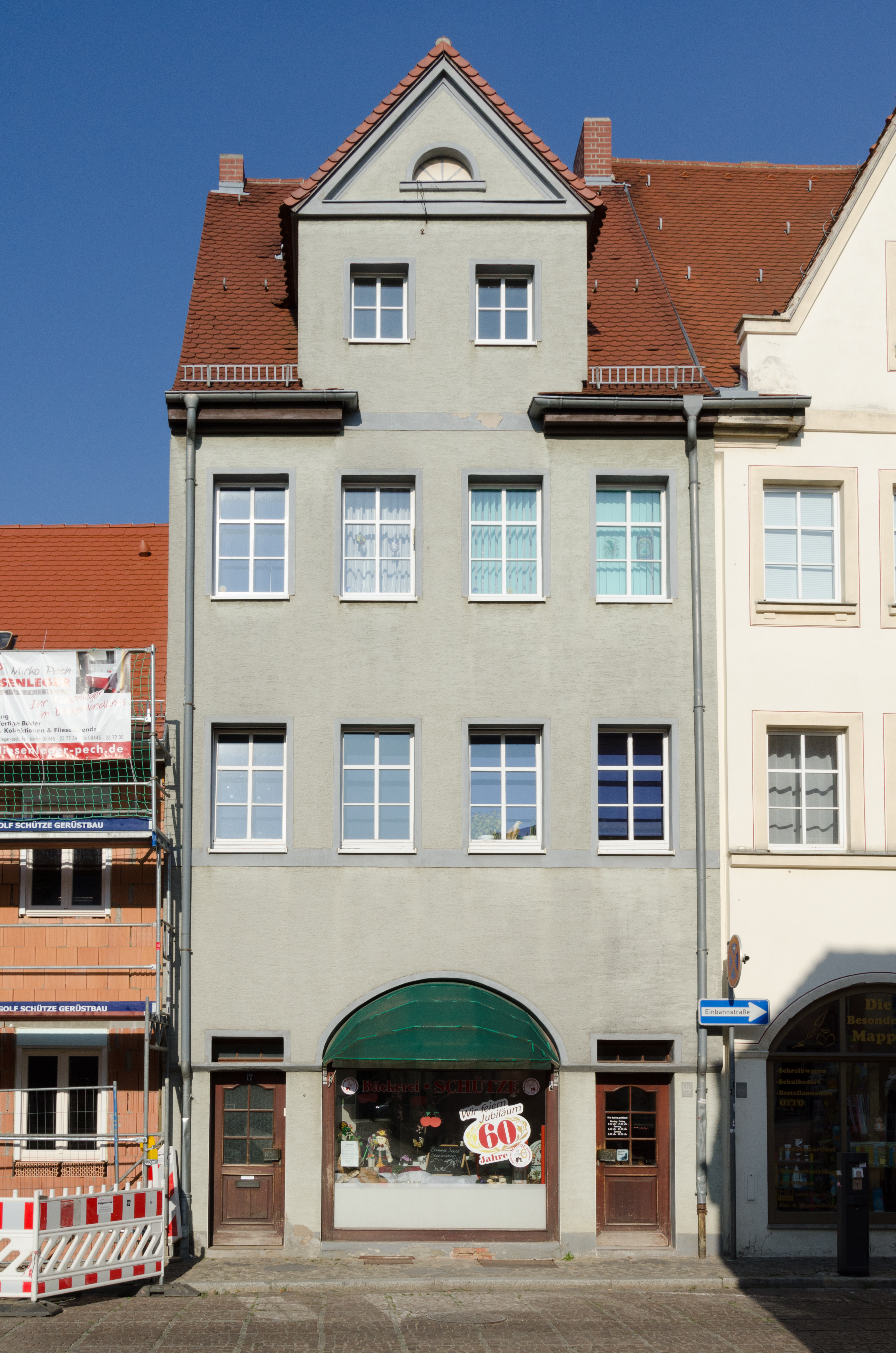 Naumburg, Marienstraße 17